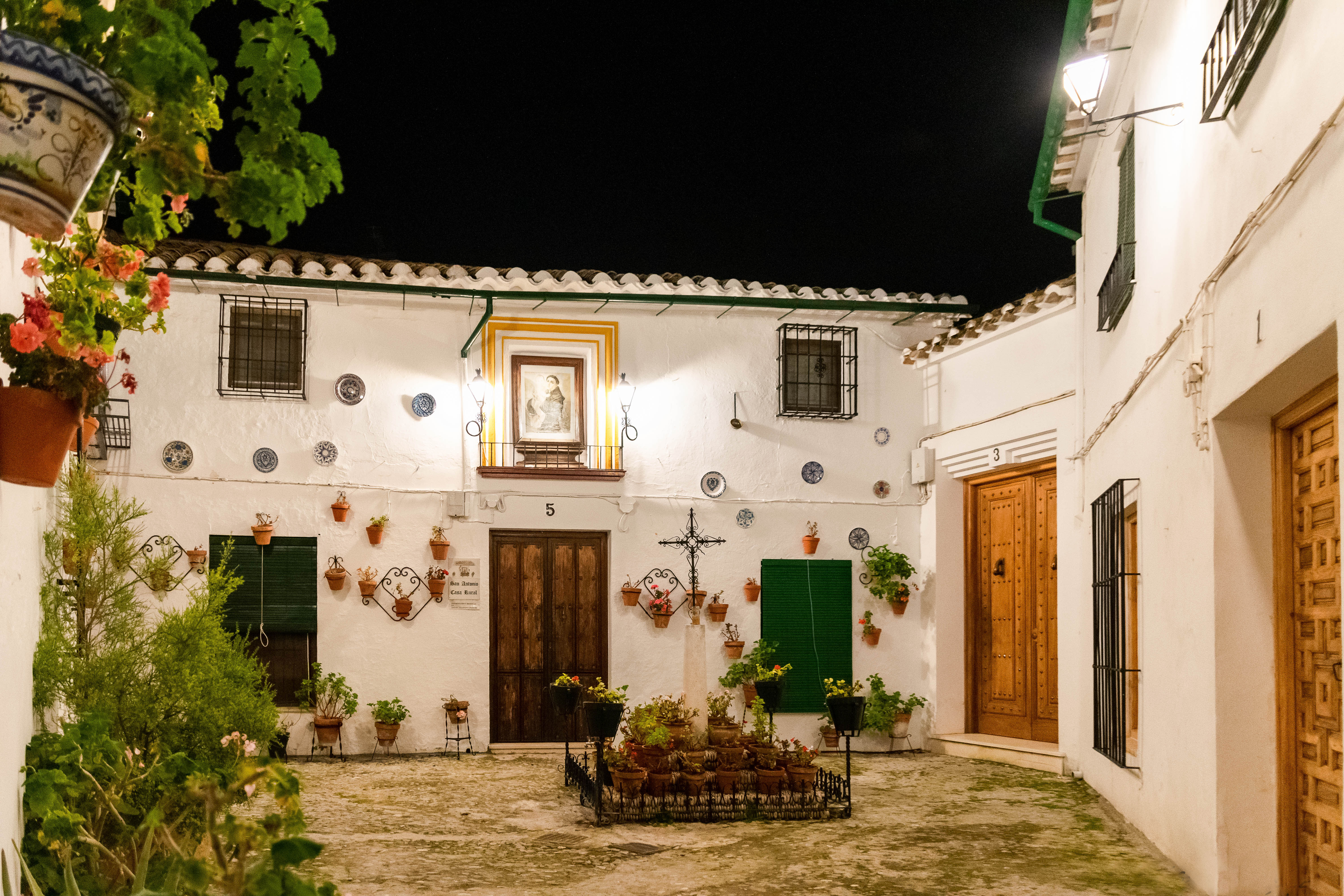 Patio del barrio de la Villa